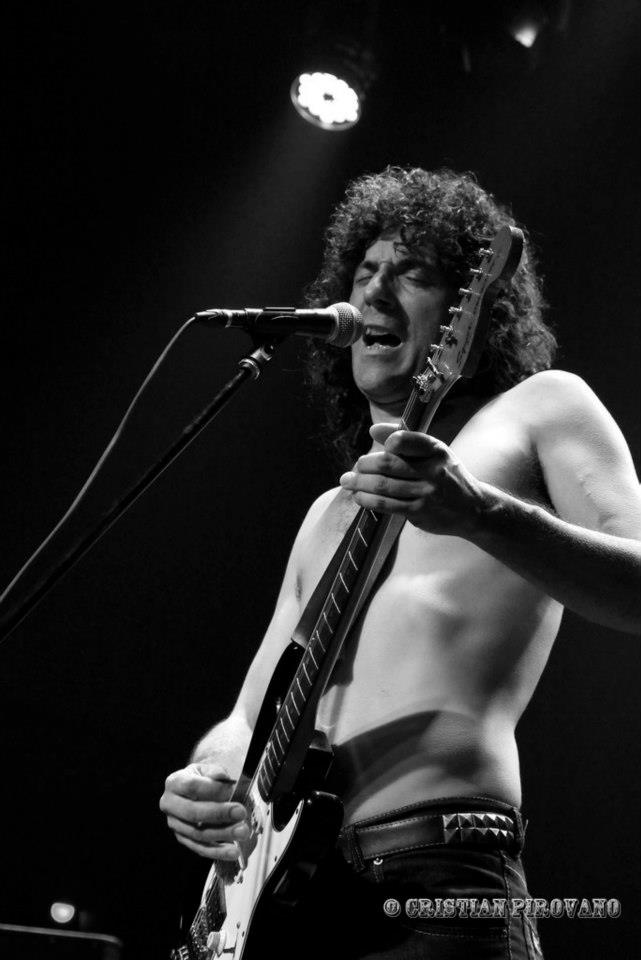 Gustavo "Pegaso" Alvarez